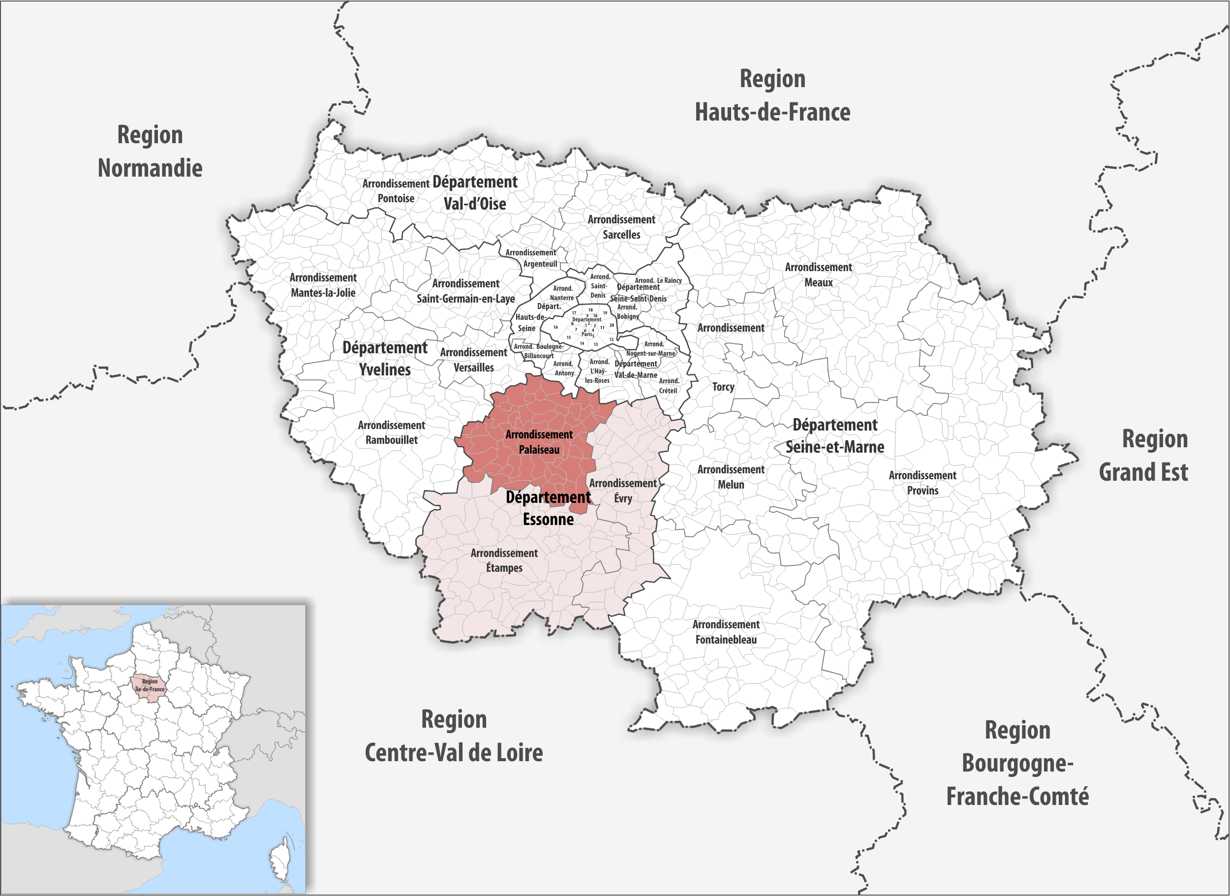 Lage des Arrondissements Palaiseau